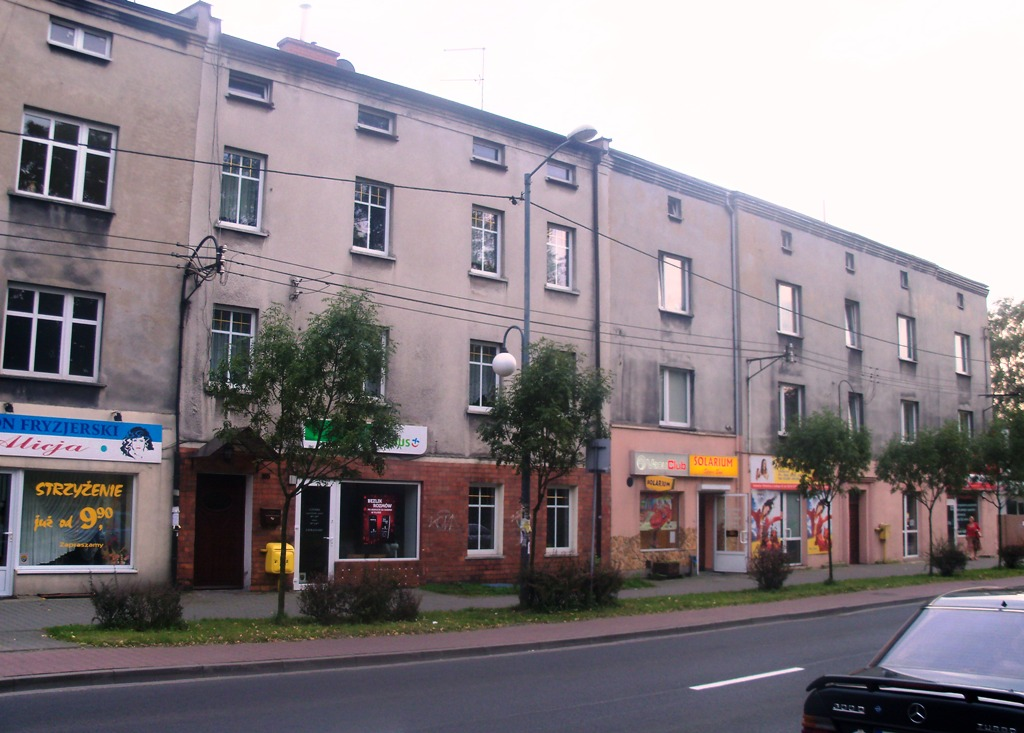 Ulica Jankego w Katowicach-Piotrowicach